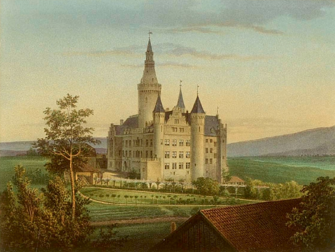 Schloss Arenfels, Kreis Neuwied, Rheinprovinz, alte Litographie nach einer Aufnahme von Winckelmann & Söhne